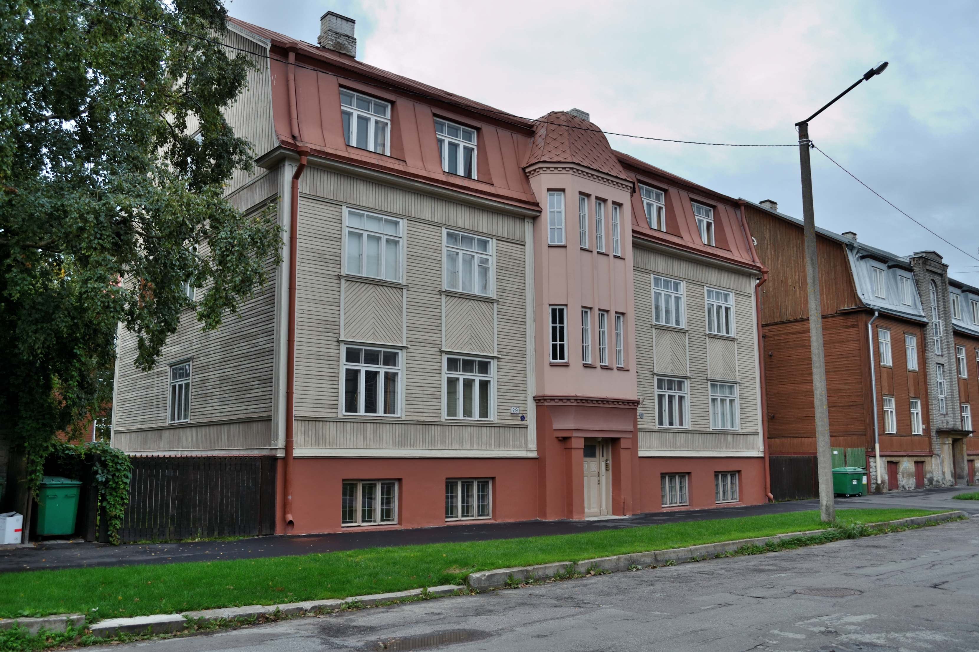 Tallinn, elamu Kalevi 29, 1920.-1930